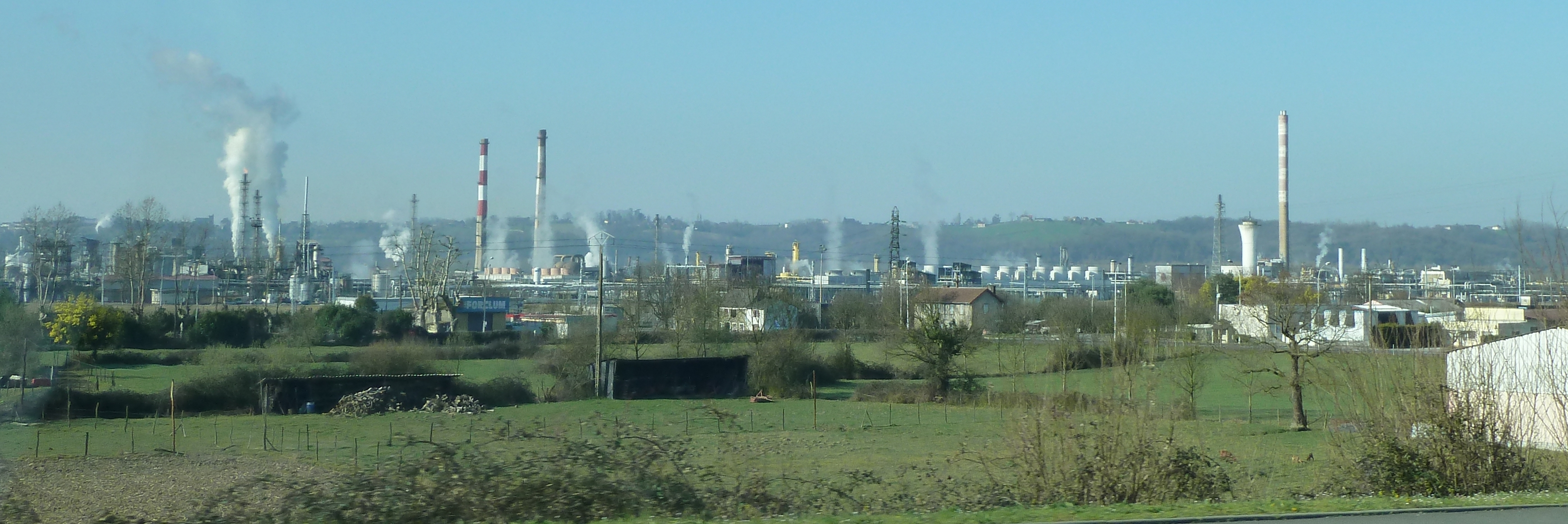 Usine d'extraction de produits pétroliers de Lacq, département 64, France